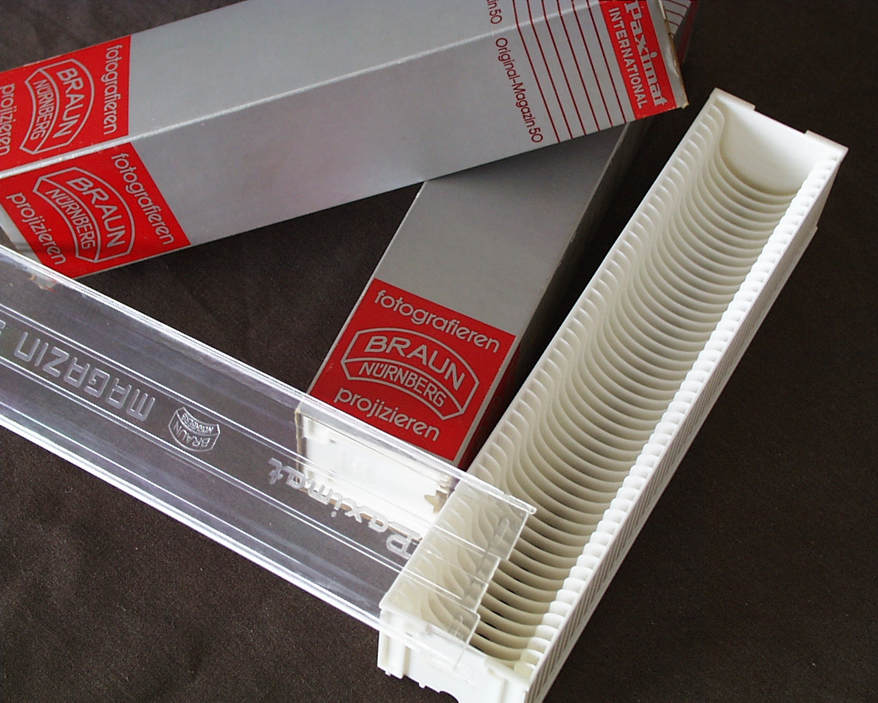 Paximat Diamagazin der Firma Braun Nürnberg, für 50 Dias 5x5cm